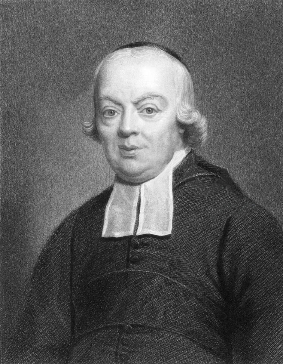 Charles-Michel de L'Épée (1712-1789).